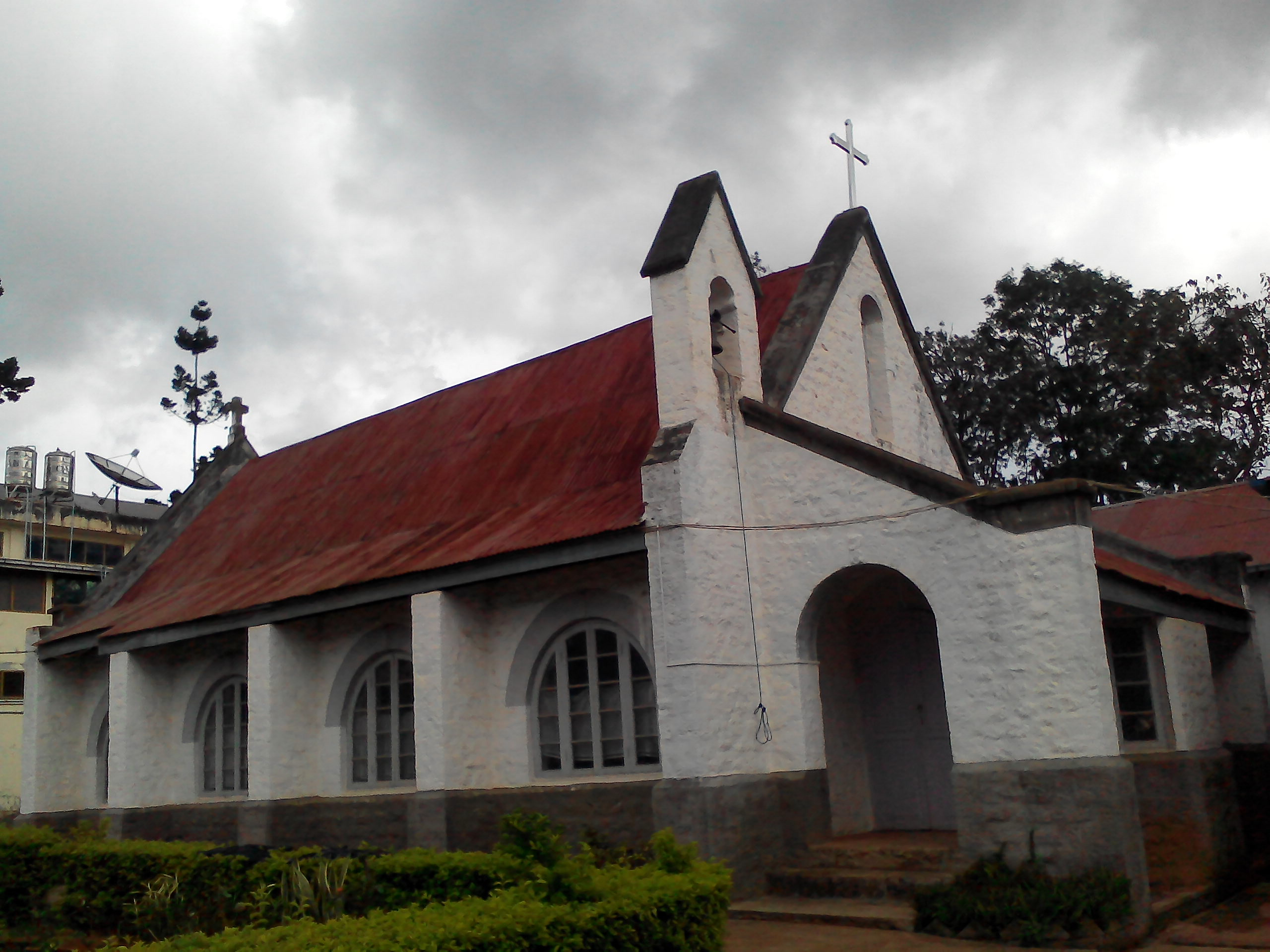 Мьянма. Таунджи. Англіканська церква святого Георгія